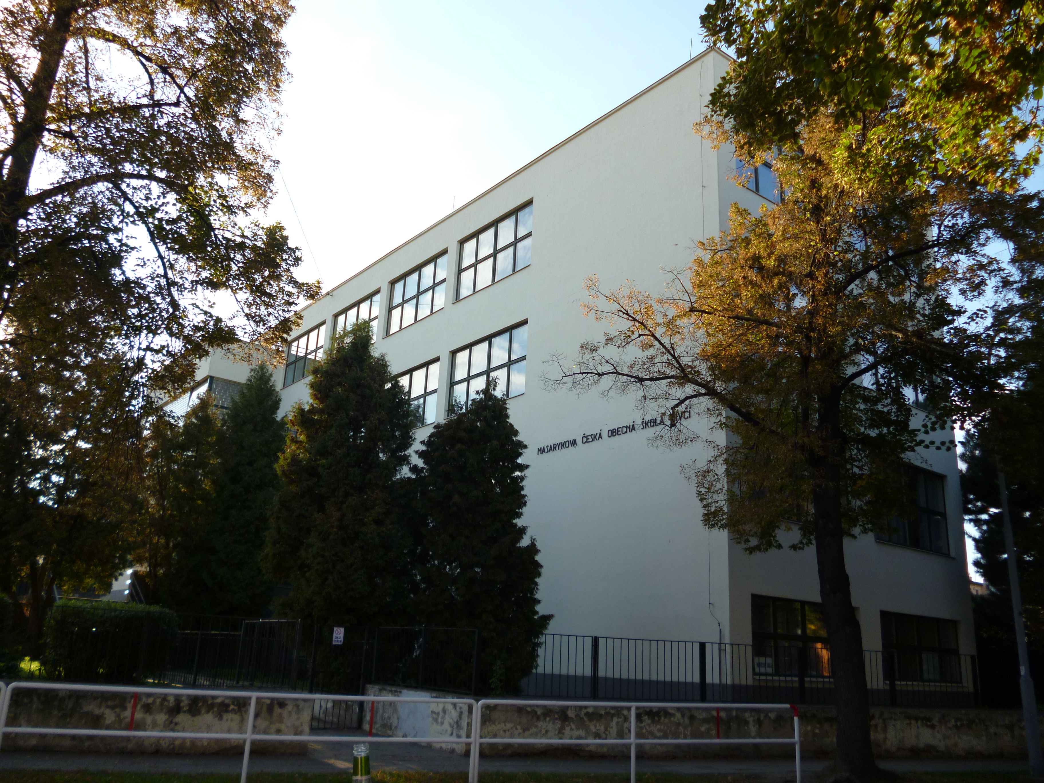 Základní škola (Brno), Černá Pole, Zemědělská, Břenkova, Jugoslávská 173/29, Brno